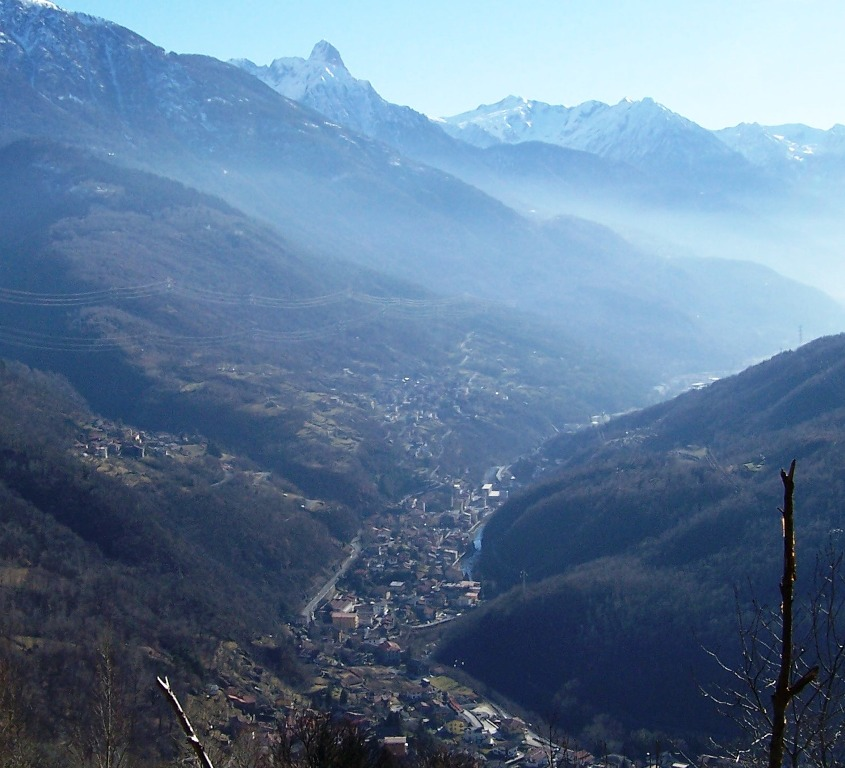 Cedegolo , Val Camonica, Italia